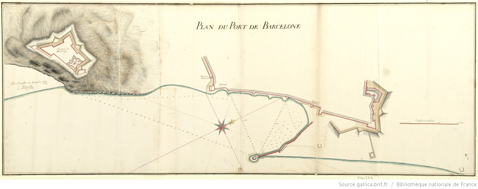 Pianta del porto di Barcellona realizzata da de Chazelles nel 1697